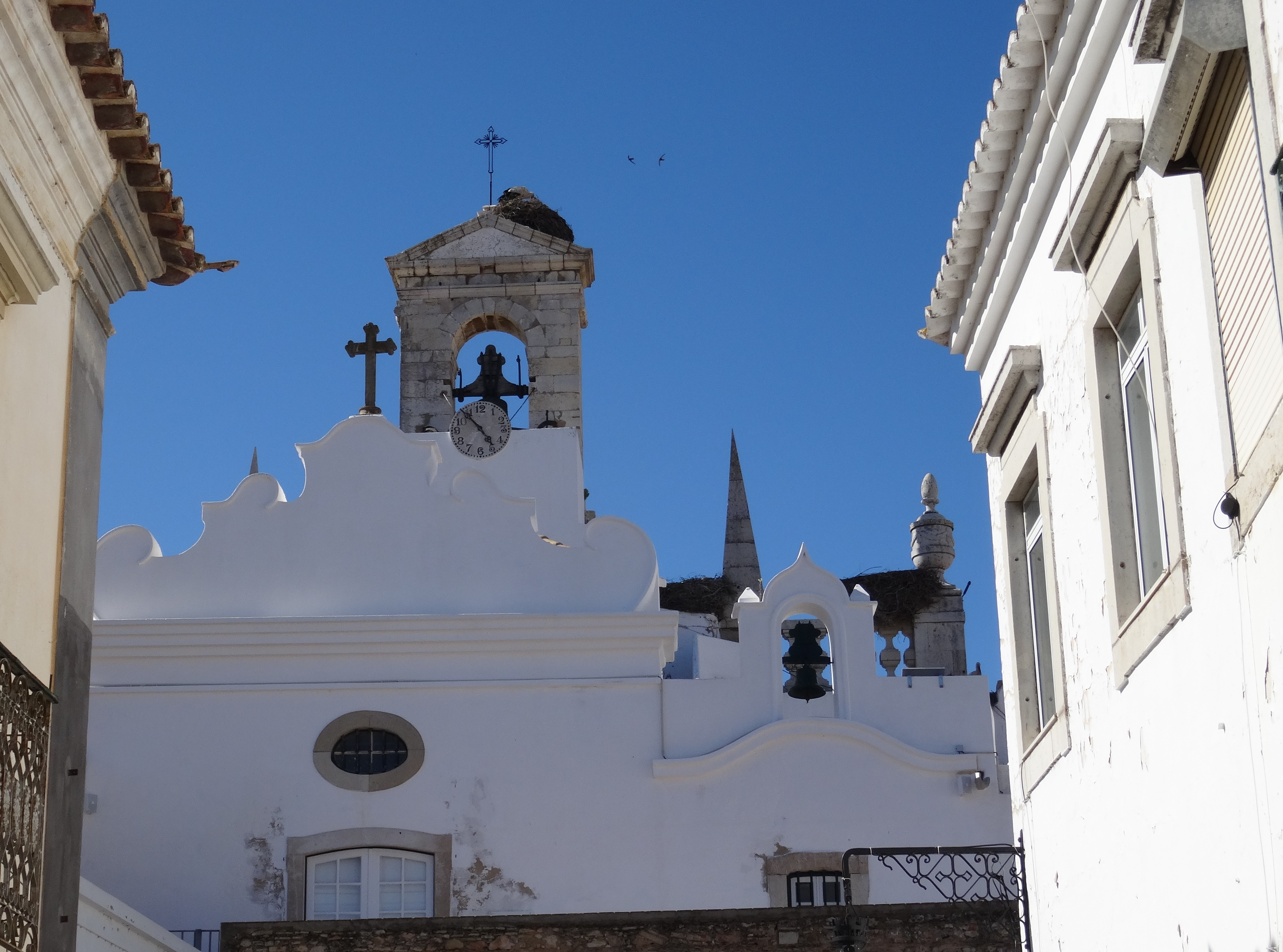 Storchennnester auf dem Arco da Vila, Faro, Portugal